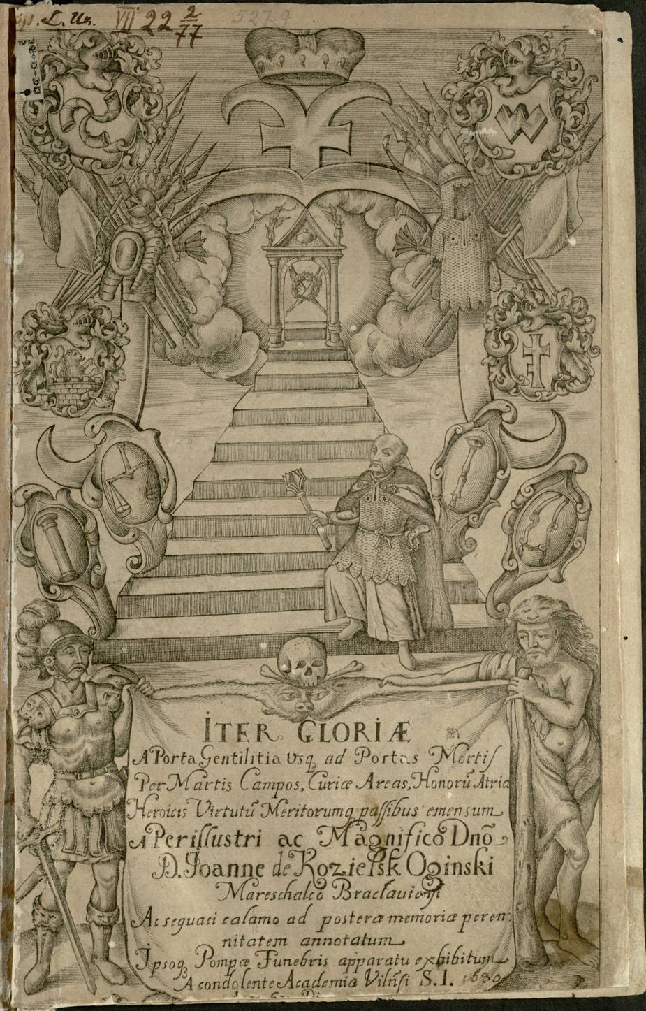 Беларуская (тарашкевіца): Панэгірык на сьмерць Яна Юрыя Агінскага (Jan Jury Aginski)